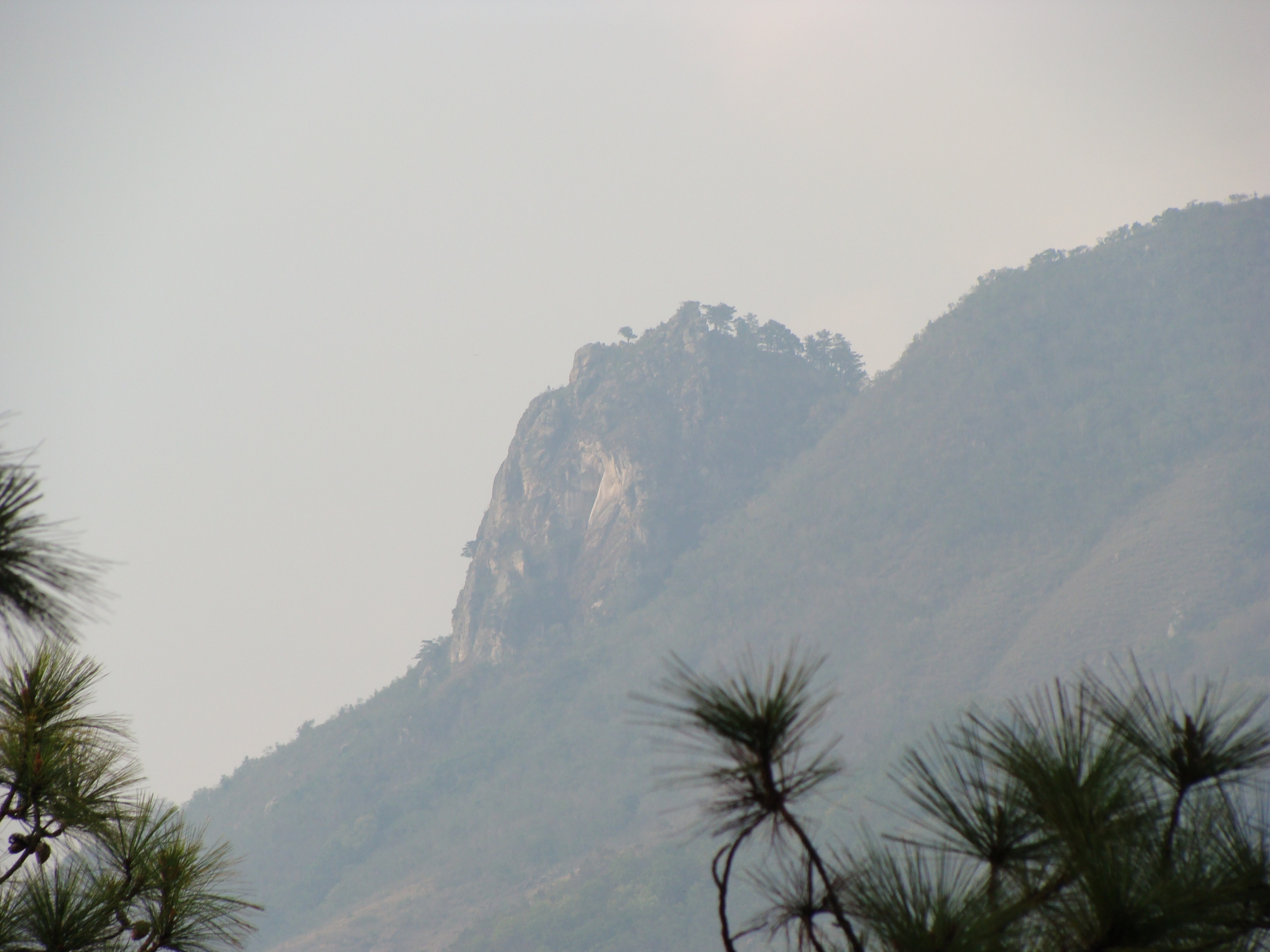 Peñón Cayaguanca. San Ignacio, Chalatenango. El Salvador